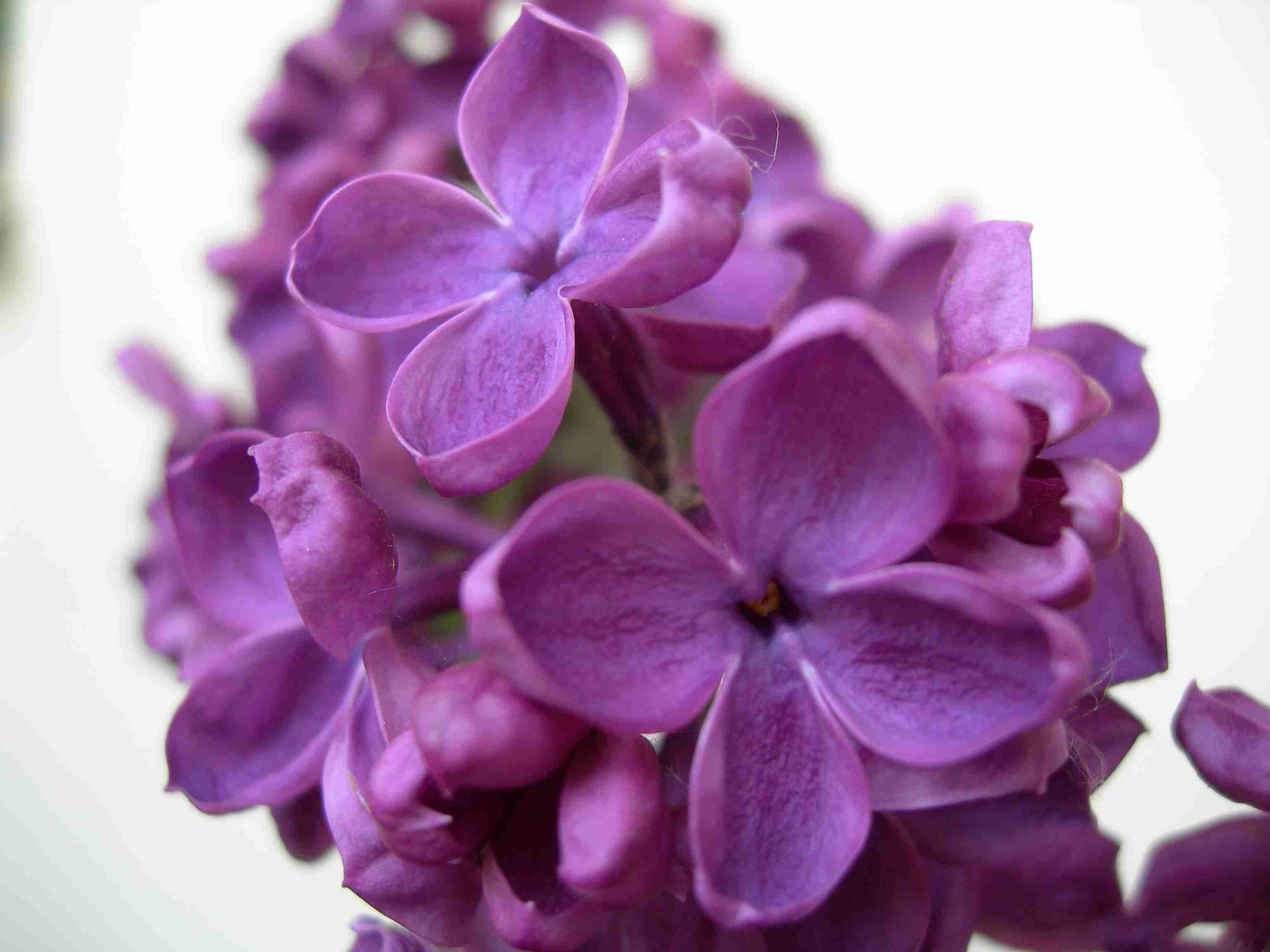 Alyvos šakelė. Foto Ieva Gaužaitė